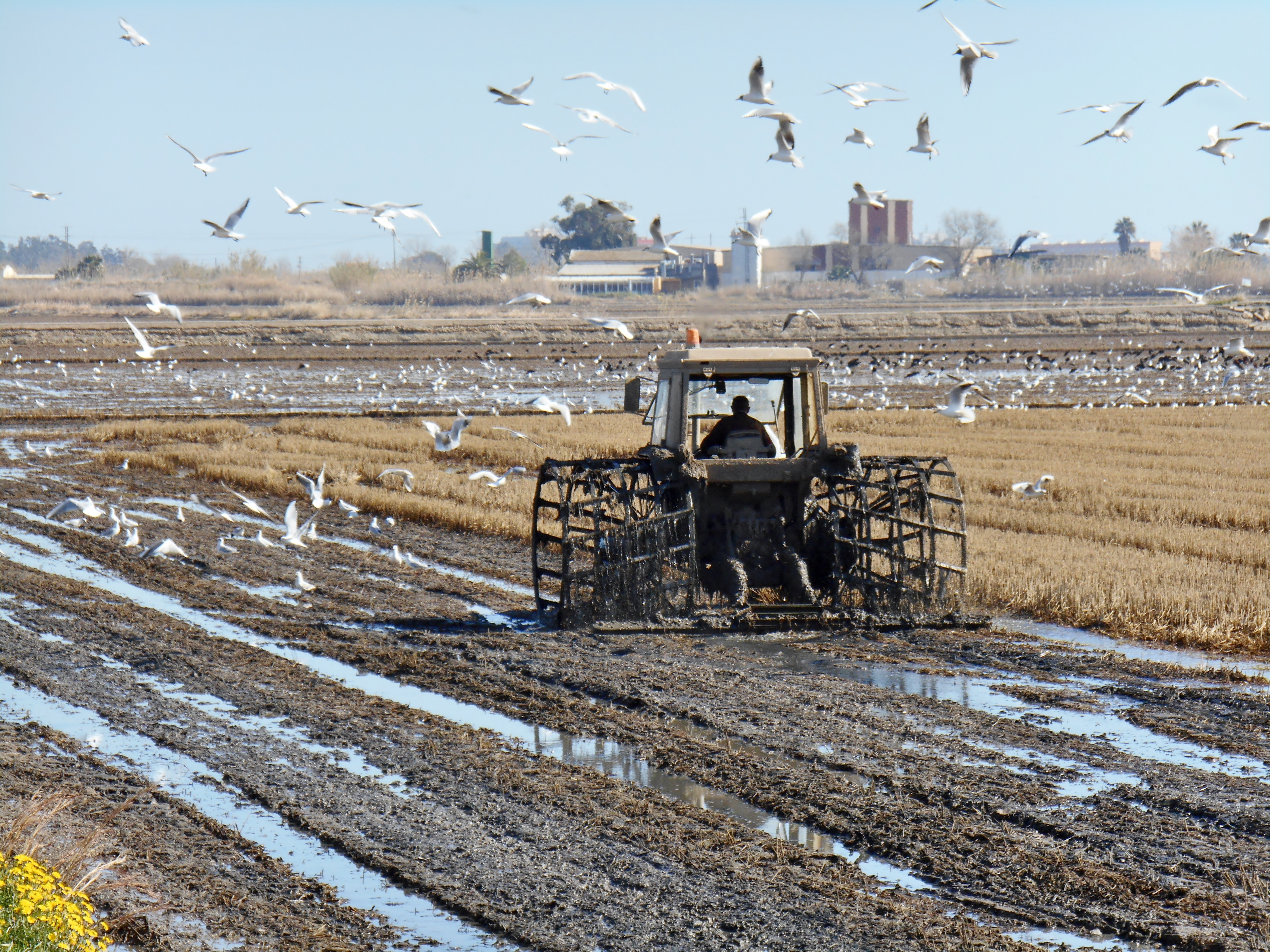 Albufera de València.